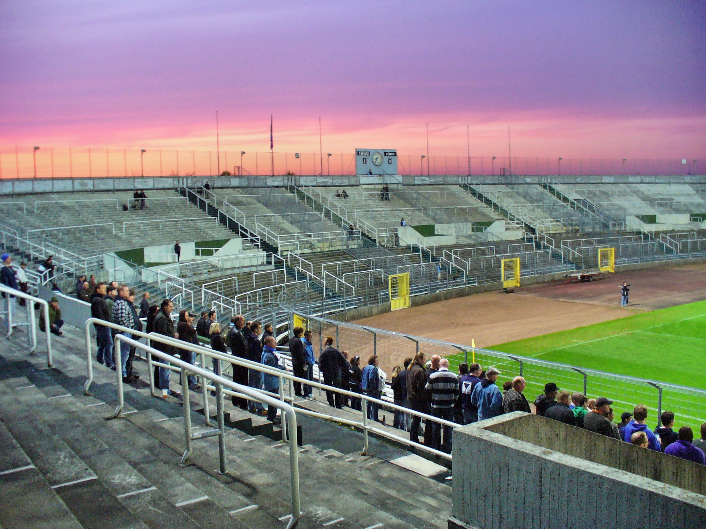 Städt. Stadion an der Grünwalderstrasse, München